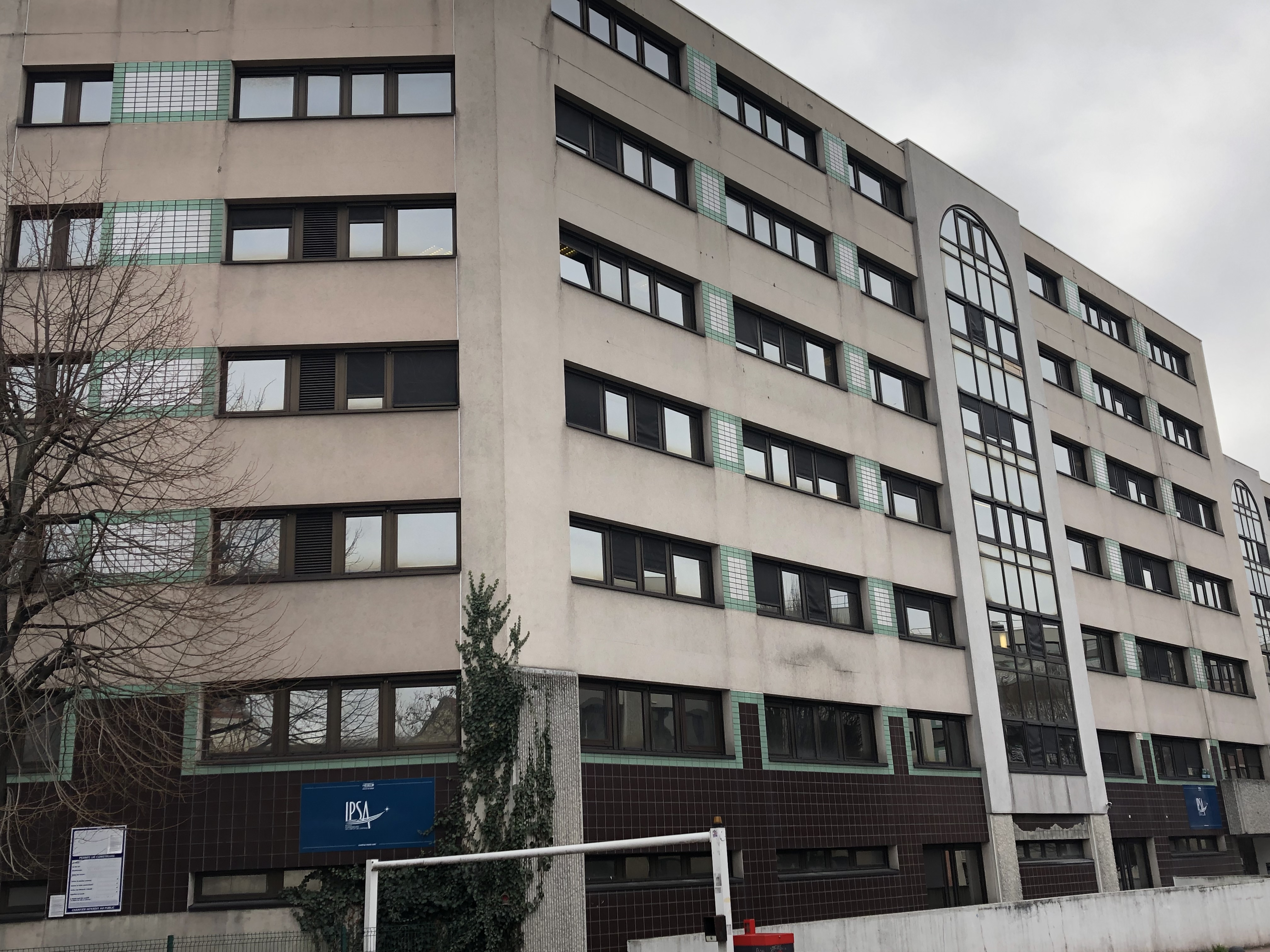 Bâtiment du Campus d'Ivry-sur-Seine de l'Ecole d'ingénieurs IPSA Paris, boulevard de Brandebourg